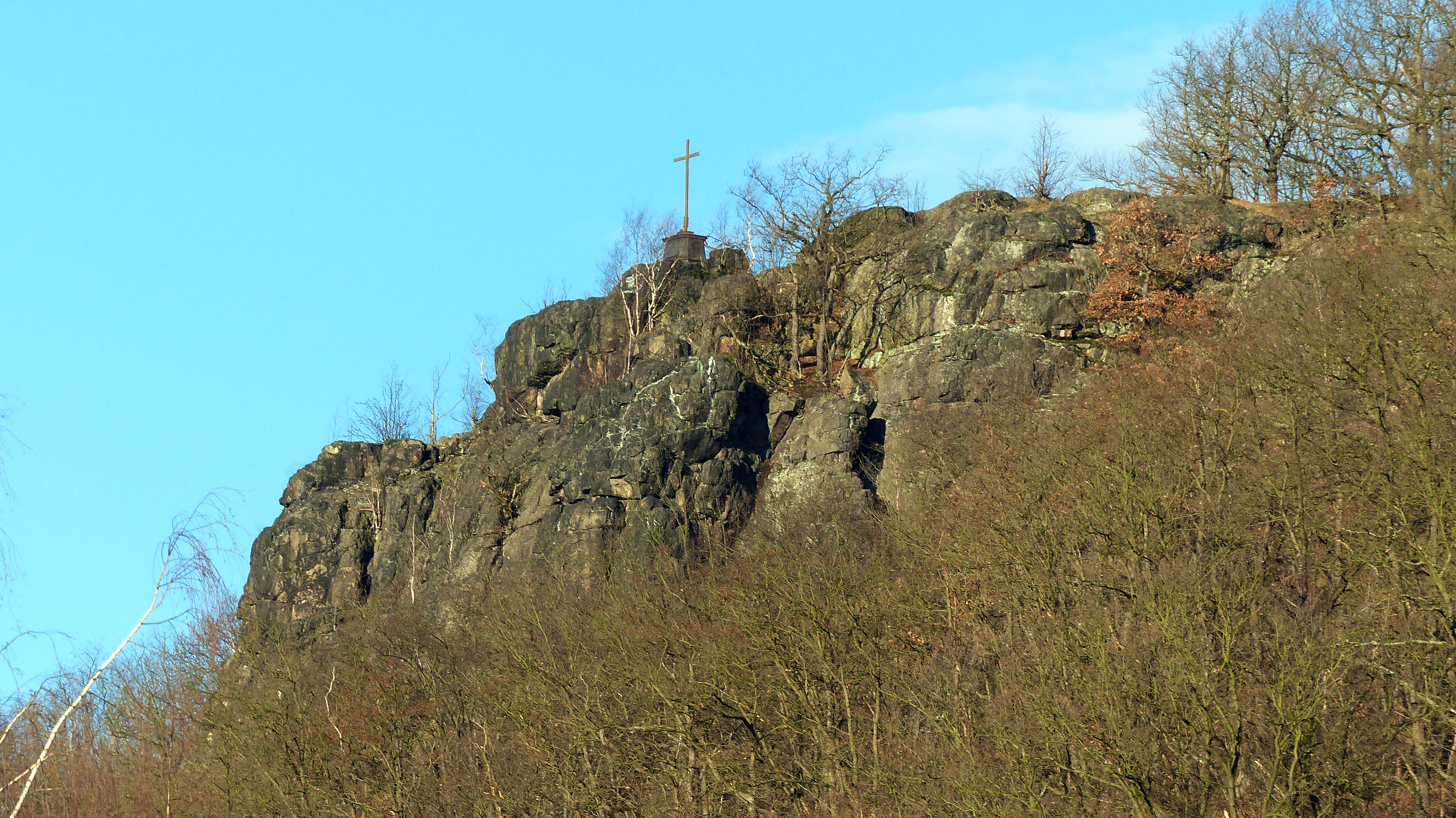 Götterfelsen in der Garsebacher Schweiz, Meißen, als Flächennaturdenkmal (FND) geschütztes Geotop, Nr. MEI 002